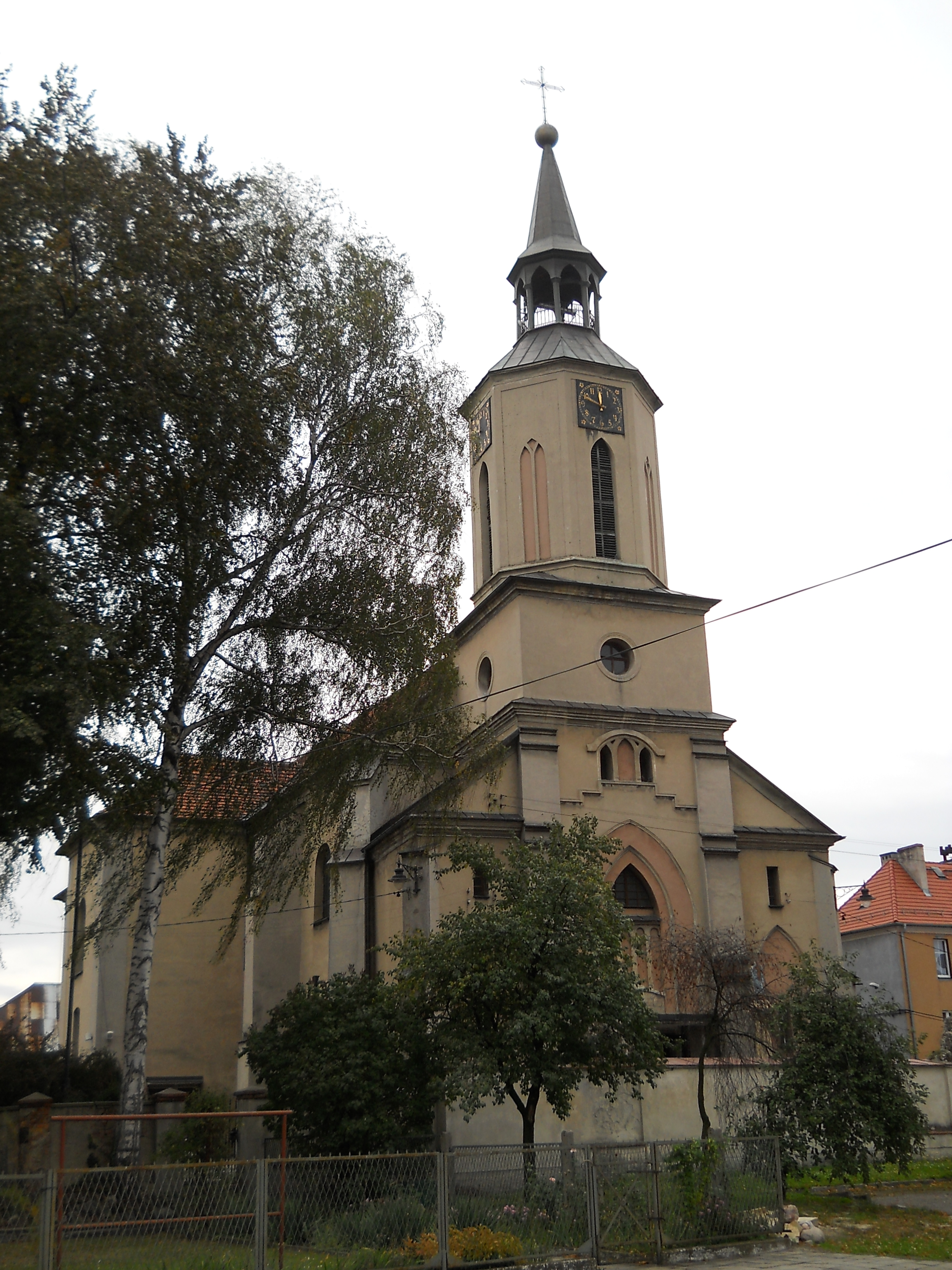 Pyskowice - kościół parafialny pw. św. Mikołaja, widok od strony głównego wejścia (zabytek nr A/289/60 z 7.03.1960)